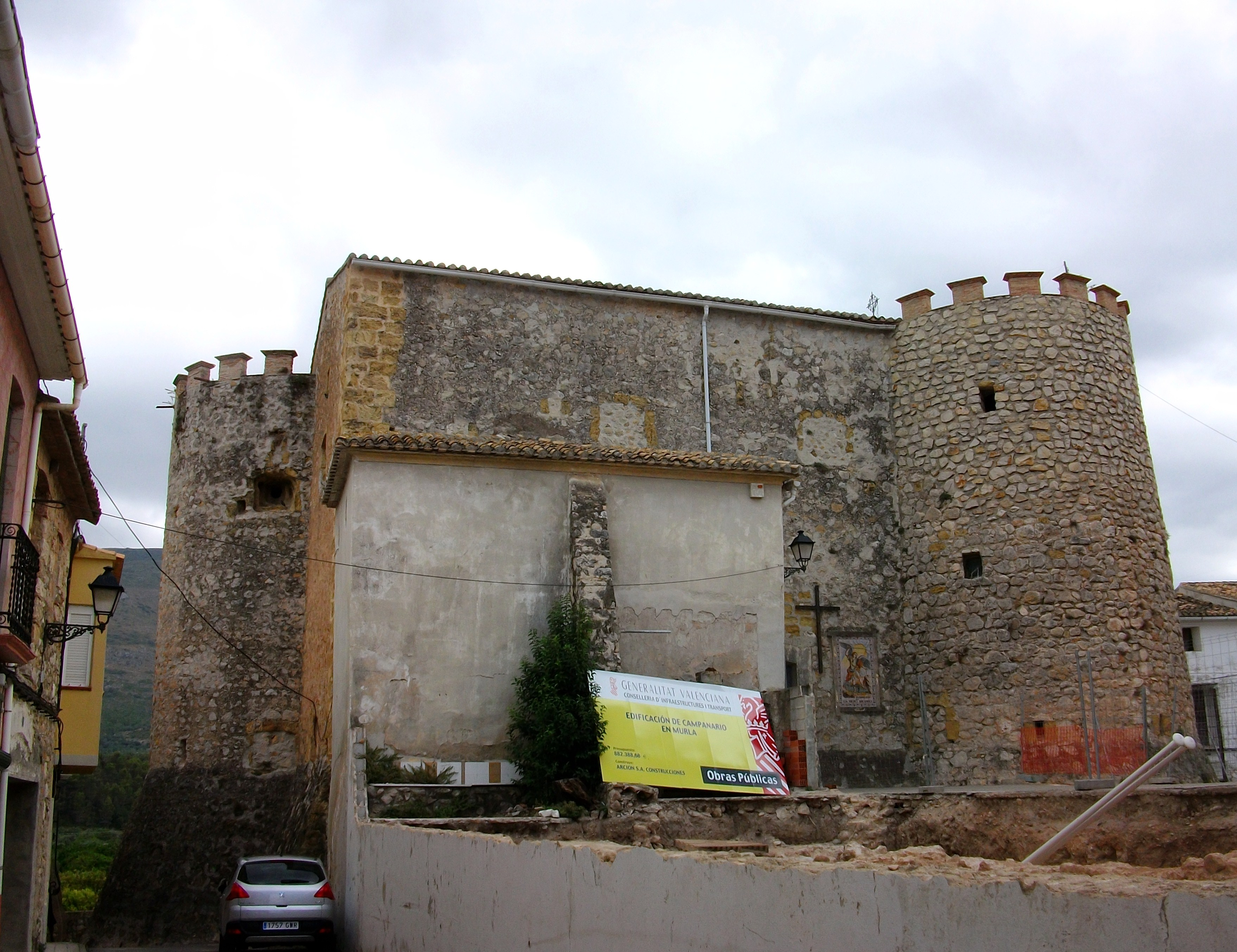 Església de Sant Miquel Arcàngel de Murla (Marina Alta, País Valencià).